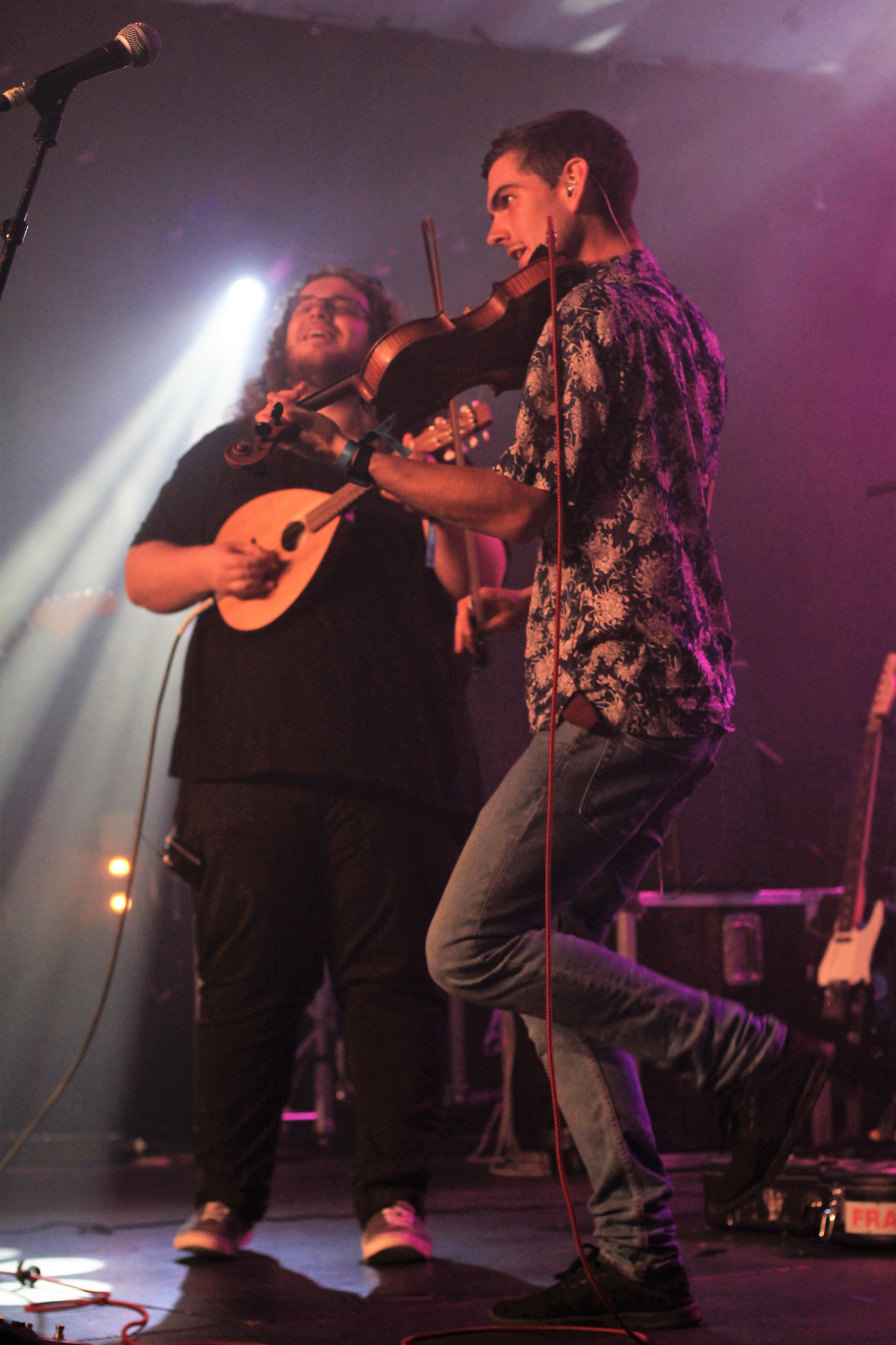 Concert d'Elephant Sessions au pavillon de l'Ecosse, lors du Festival interceltique de Lorient 2017.